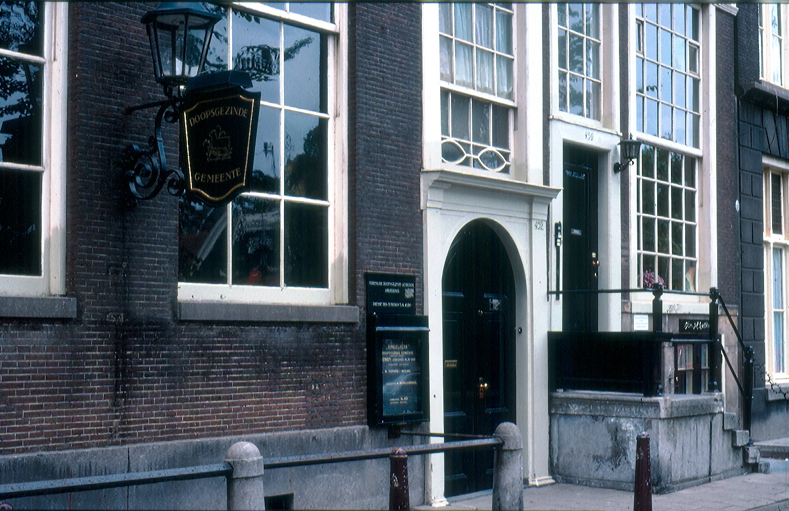 Doopsgezinde Gemeente exterior view, Amsterdam